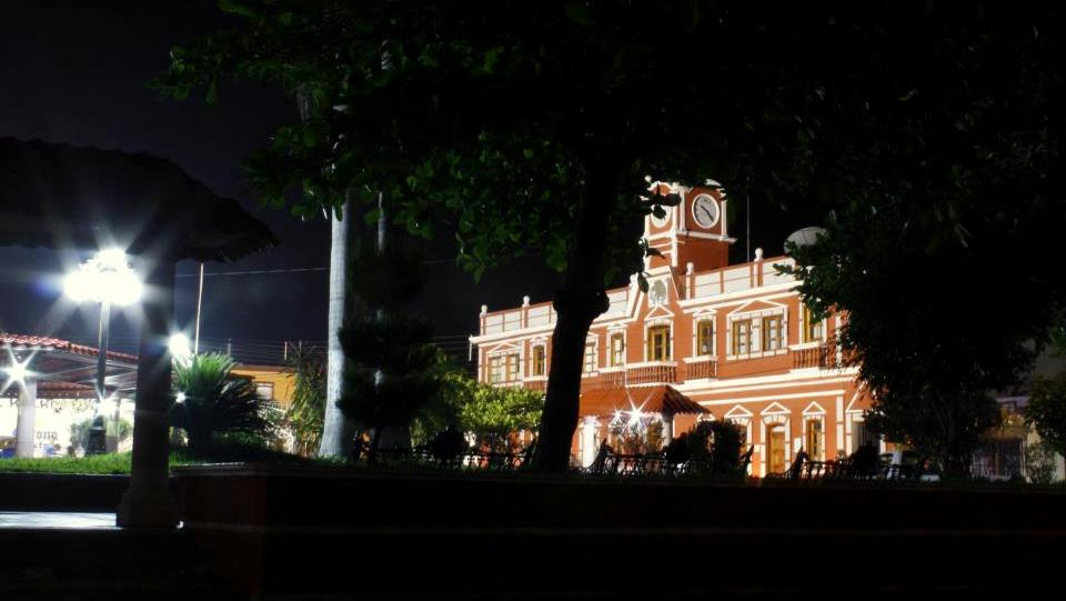 Vista de noche desde una de las calles del centro del municipio.